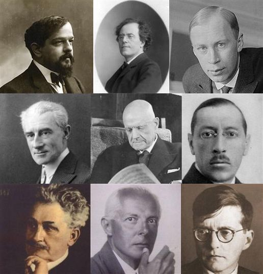 montage photo de compositeurs de musique classique